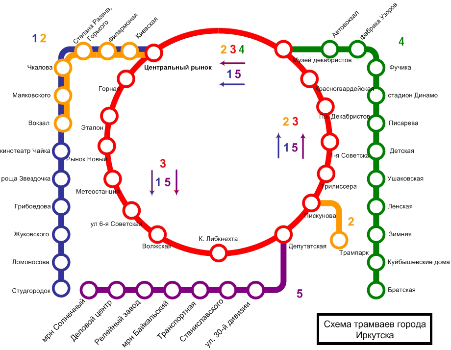 Схема линий Иркутского трамвая